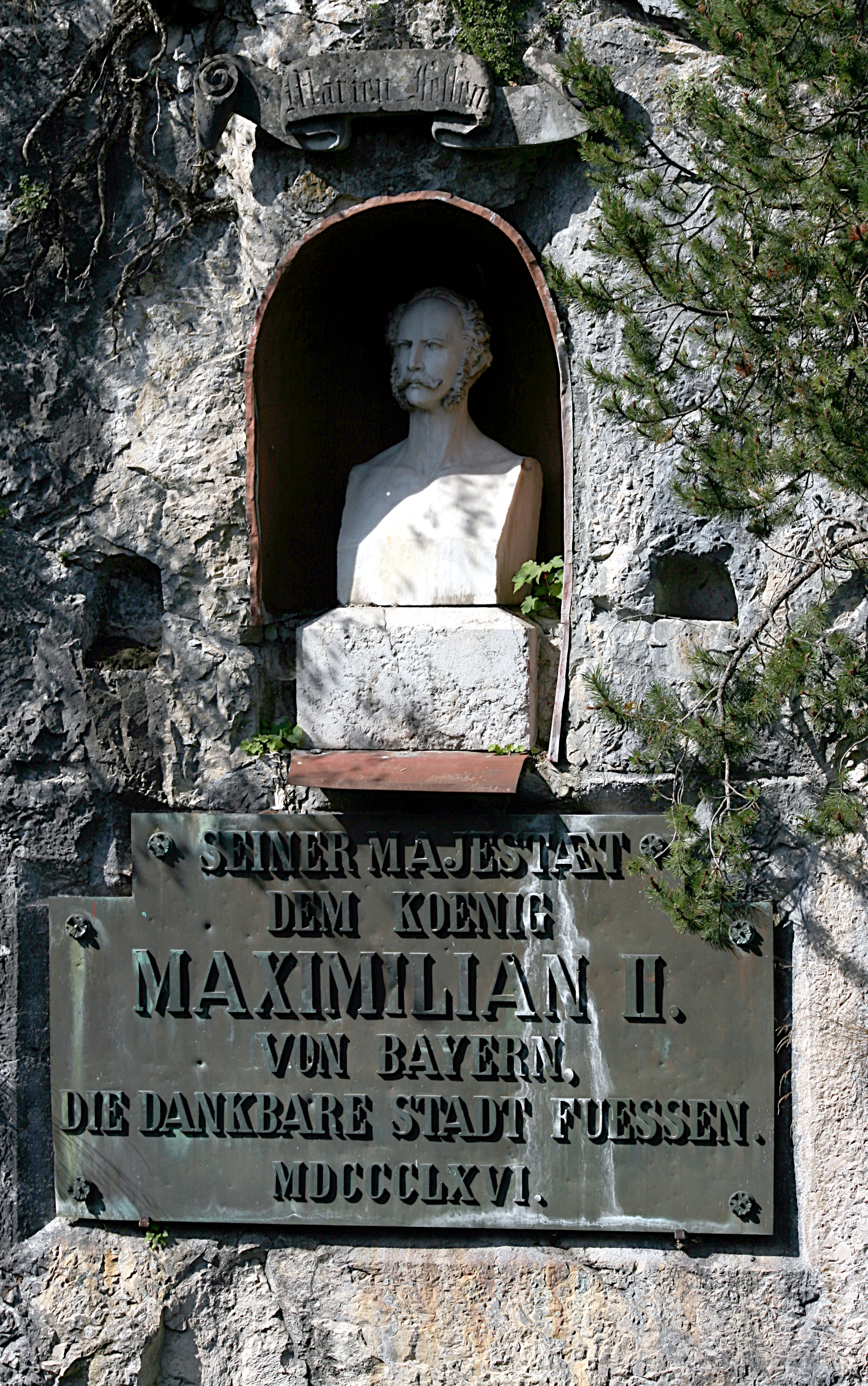 Füssen Marien-Felsen: Maximilian_II._(Bayern) (Laaser Marmor), Standort: Tirolerstraße (linkes Lechufer, flußabwärts gleich nach dem Lechfall). Enthüllung am 26. Juni 1866. Entwurf: August Sommer (Coburg), Ausführung: Karl Müller.